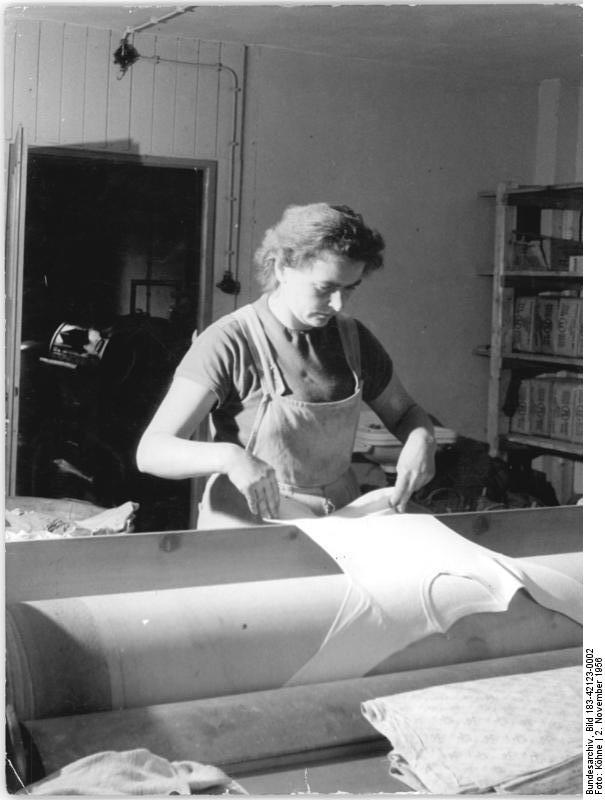 LPG Merxleben, Blick in die Wäscherei Zentralbild Köhne 2.11.1956 Die Arbeiter- und Bauernmacht brachte Wohlstand in thüringisches Bauerndorf LPG Merxleben, Kreis Langesalzen Eine der erfolgreichsten Landwirtschaftlichen Produktionsgenossenschaften unserer Republik ist die LPG in Merxleben. Die Genossenschaft gleicht heute einer kleinen Agrarstadt und hat einen Wert von über vier Millionen DM. Ihre grossen Erfolge konnten die Genossenschaftsbauern durch die Anwendung neuester Arbeitsmethoden und Ausschöpfung aller Arbeitereserven erzielen. UBz: Um den Genossenschaftsbäuerinnen die Arbeit zu erleichtern, wurde eine Dorfwaschanlage errichtet. Die Genossenschaftsbäuerin Edeltraut Borm, die seit längerer Zeit in der Wäscherei tätig ist, an der Heissmangel.